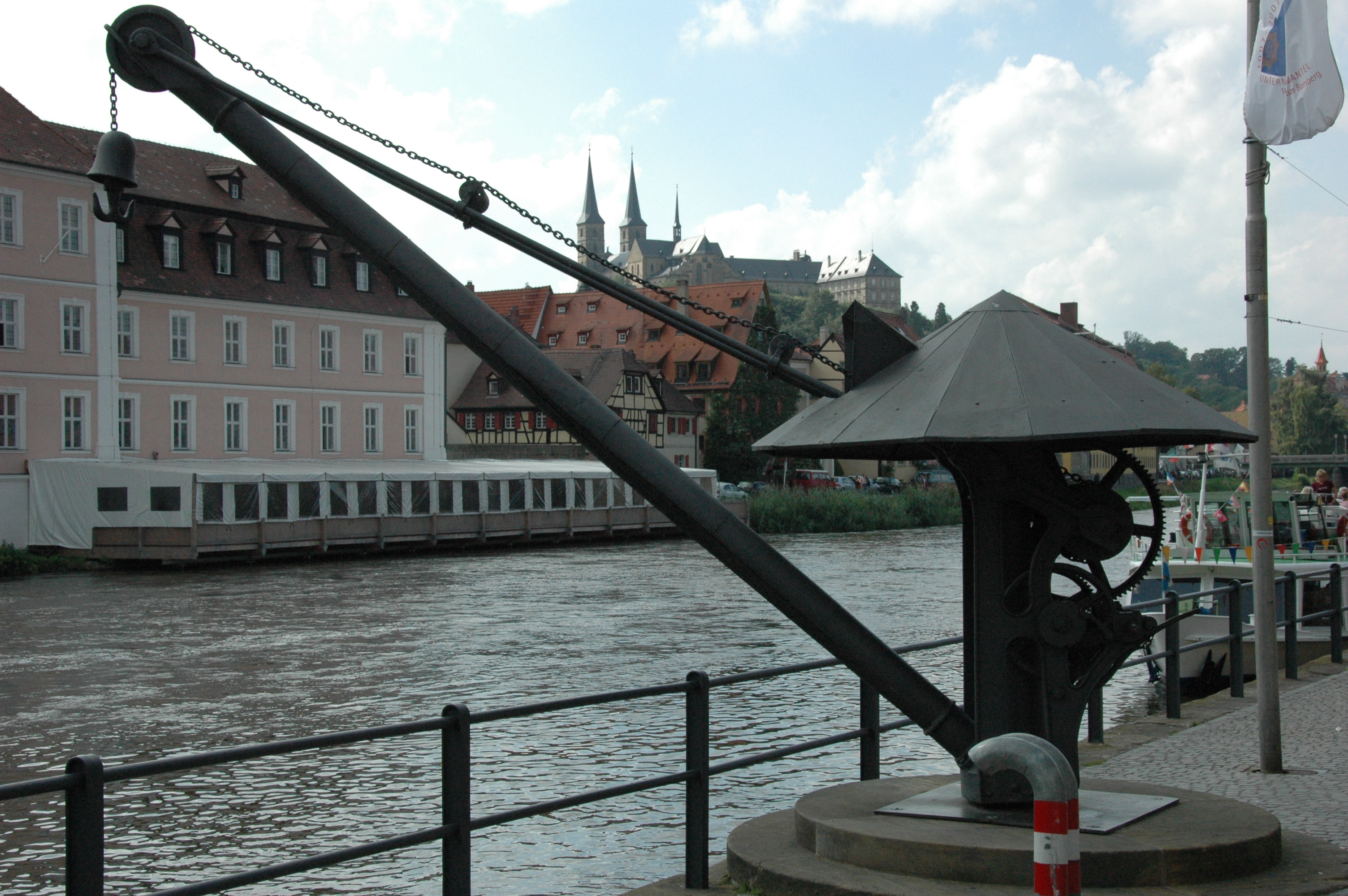 Bamberg, kraan aan de haven